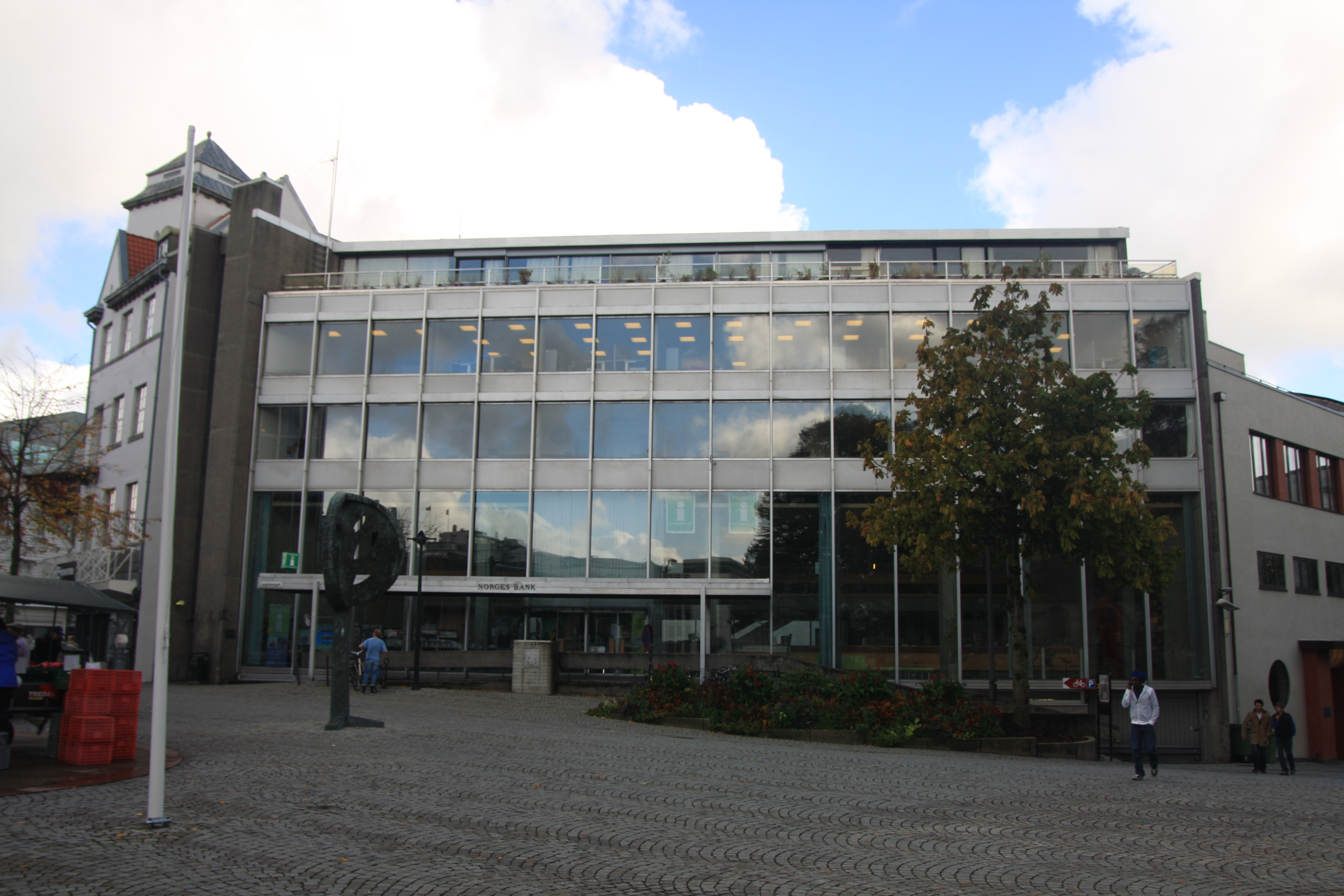 Norges Bank_bygningen